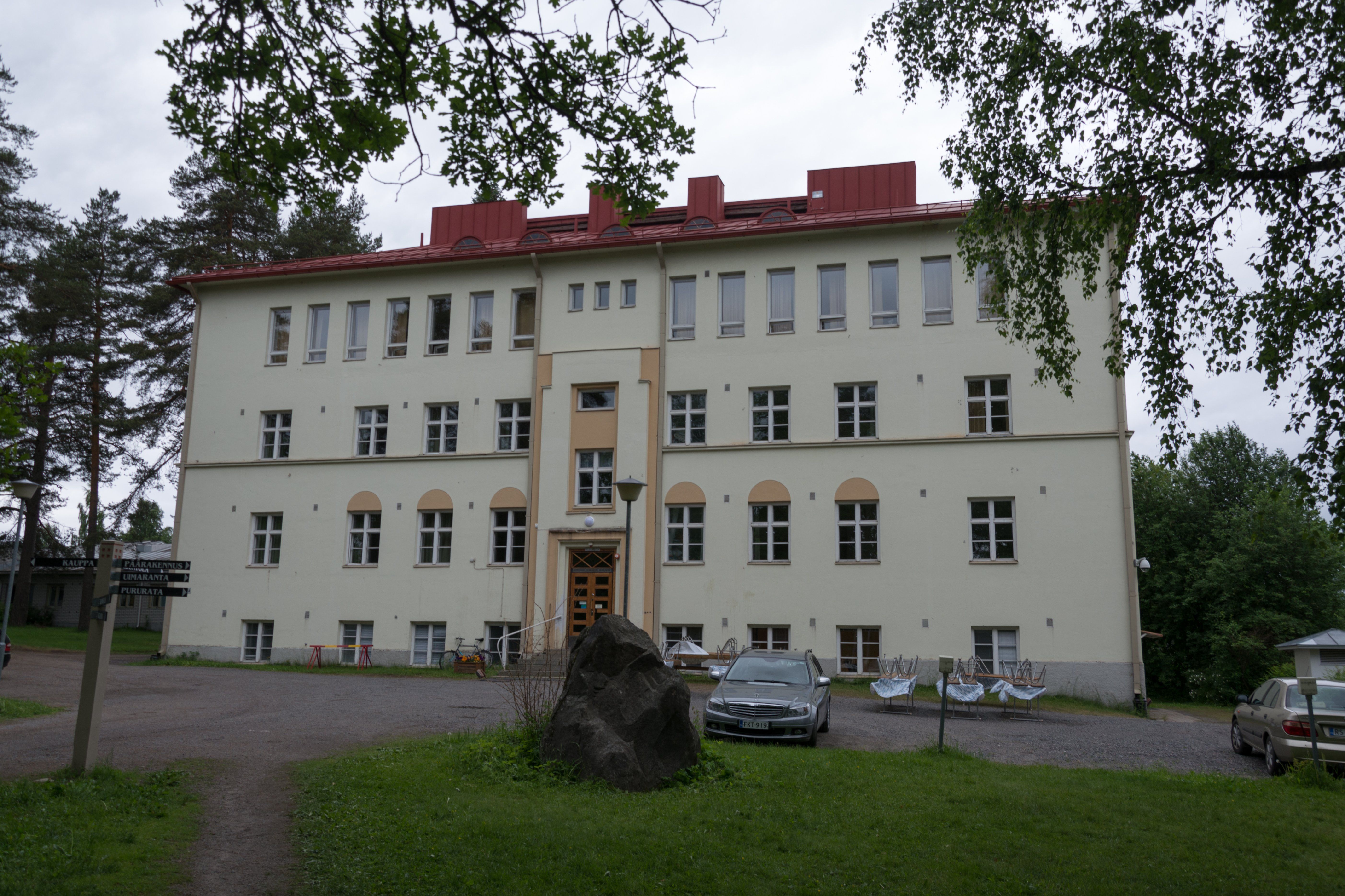 Otavan Opiston lisärakennus